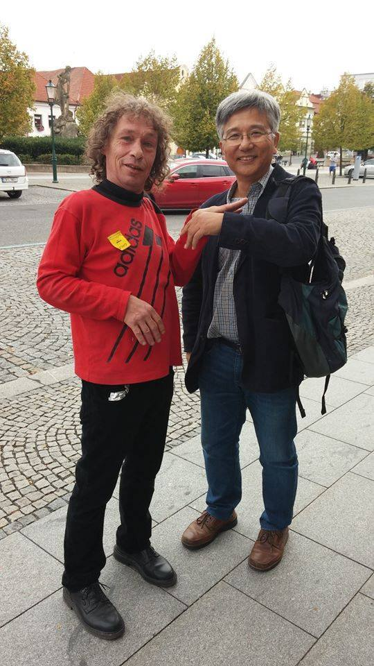 Jan Badalec (vlevo) a Jongsil Lee v Berouně. Personality rights warningAlthough this work is freely licensed or in the public domain, the person(s) shown may have rights that legally restrict certain re-uses unless those depicted consent to such uses. In these cases, a model release or other evidence of consent could protect you from infringement claims.